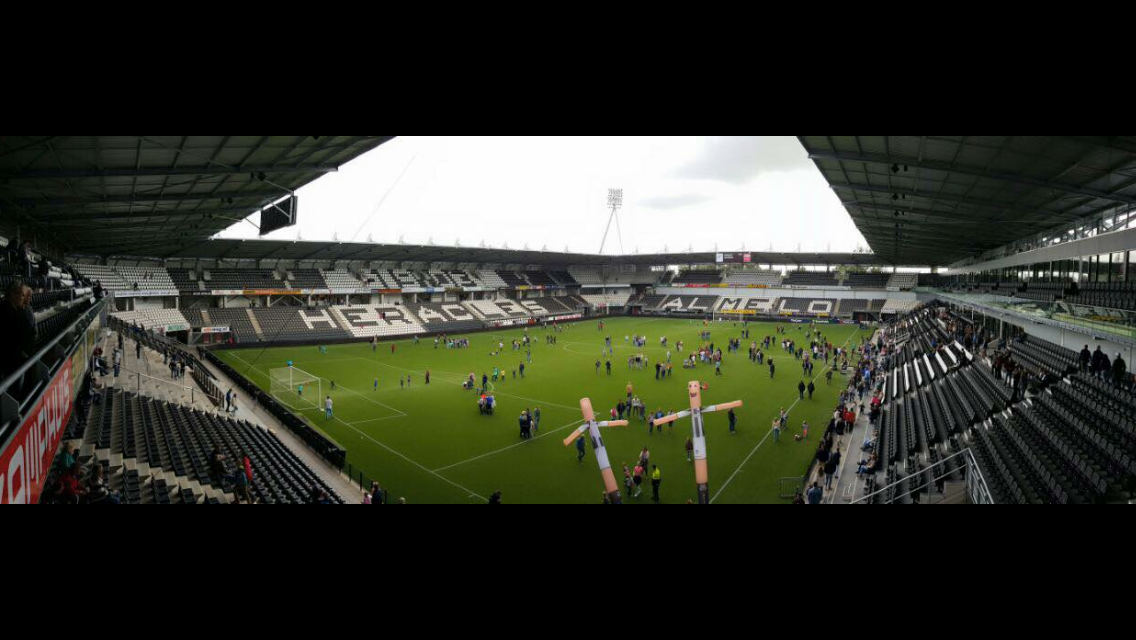 Het vernieuwde onderkomen van Heracles Almelo.